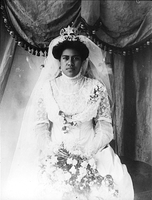 Chusseau-Flaviens, Ch. French (active 1890s-1910s) TITLE ON OBJECT: Tonga Reine Takito [Takipo] ca. 1900-1919 negative, gelatin on glass 15 x 11 cm. Gift of Kodak Pathe 75:0111:2376